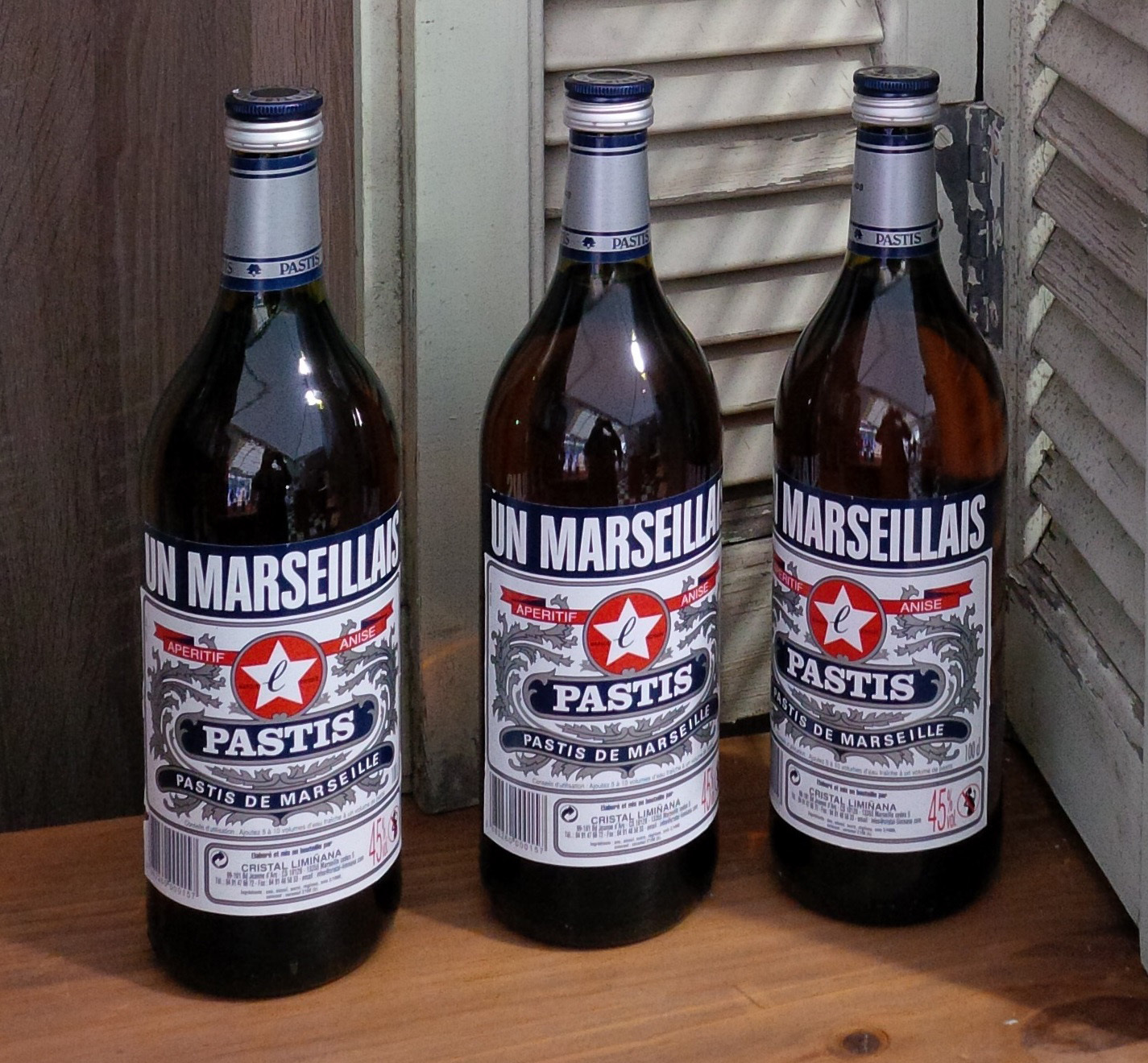 Pastis de Marseille Un Marseillais. Fabriqué à Marseille par Cristal Limiñana